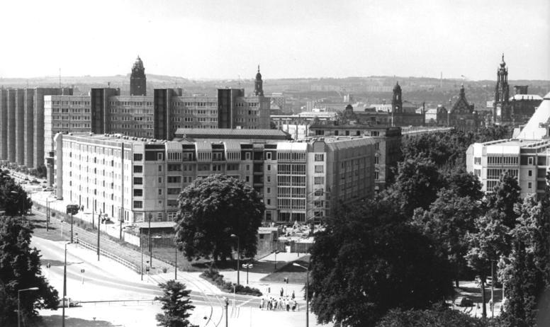 Dresden, Platz der Einheit, Neubauten, Wohnblocks ADN-ZB Häßler 24.7.87 Dresden: Wohnungsbau- Fast täglich ändert sich das Aussehen des Platzes der Einheit, einem der Schwerpunkte des innerstädtischen Bauens der Bezirksstadt. Abgeschlossen sind bereits die Montagearbeiten an der Straße der Befreiung an der Südseite des Platzes. Ein Teil der Wohnungen wurde bereits bezogen. Gegenwärtig montieren die Bauleute der Kranreihe 51 vom WBK Dresden an der Nordseite des Platzes. 368 Wohnungen sollen sie hier bis Jahresende errichten. -siehe auch 1987-0724-4N